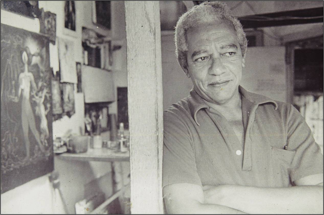 Mariano Suárez del Villar pintor y musico cubano